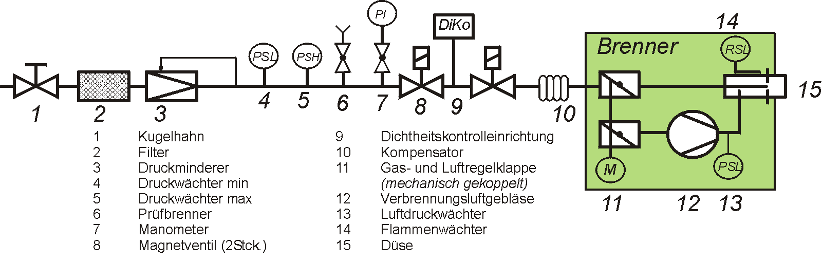 Gasregelstrecke und Gasbrenner